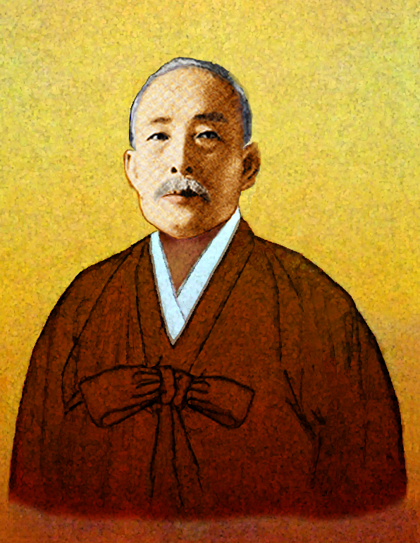 해악 박중양 선생 초상화